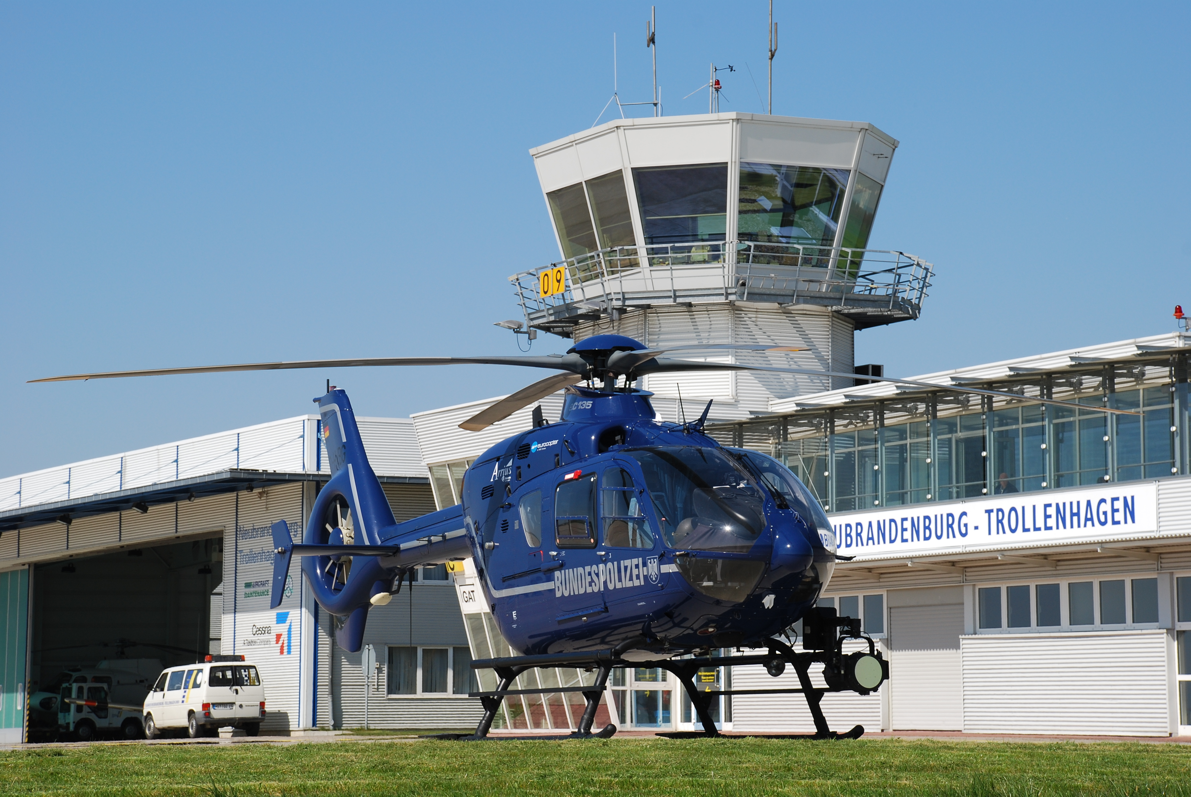 EC135 Bundespolizei D-HVBG (13)